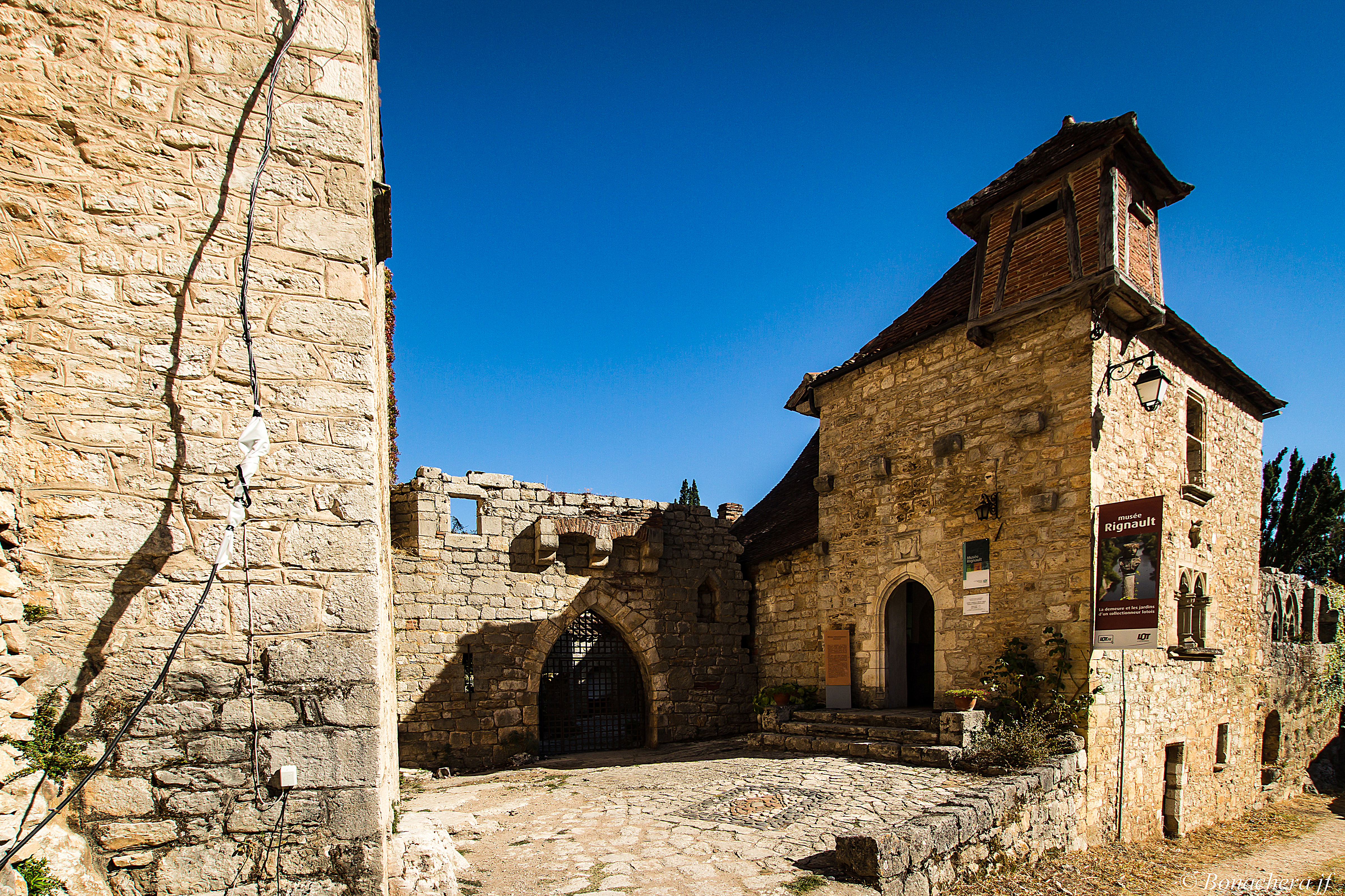 Le musée Rignault dans le village de St CIrq La Popie